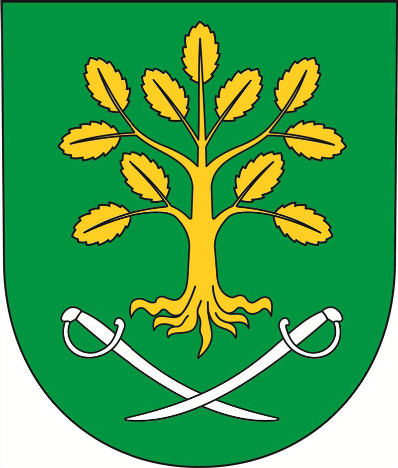 Herb gminy Brzeziny w województwie łódzkim